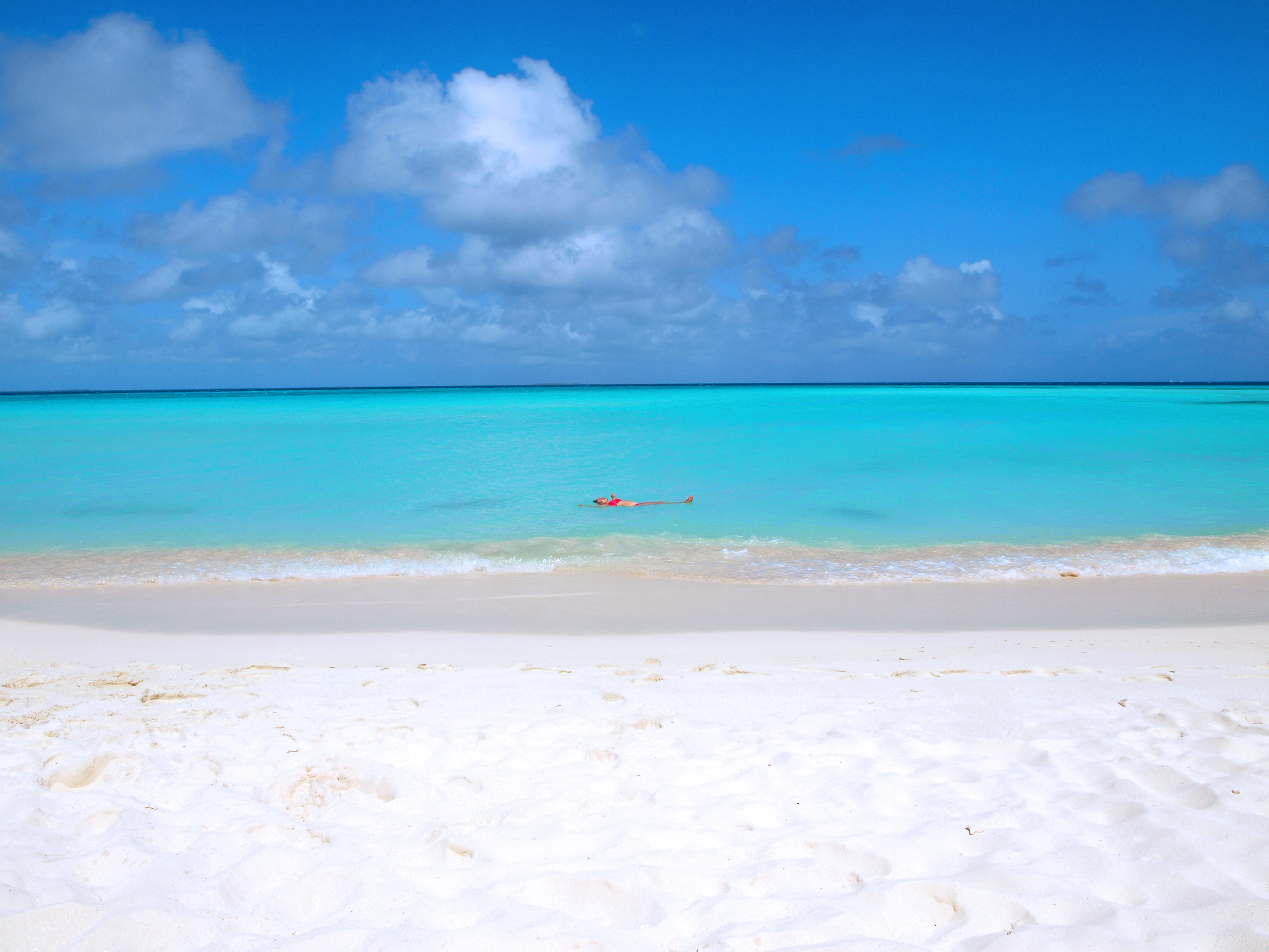 Playa en Los Roques. Flotando.